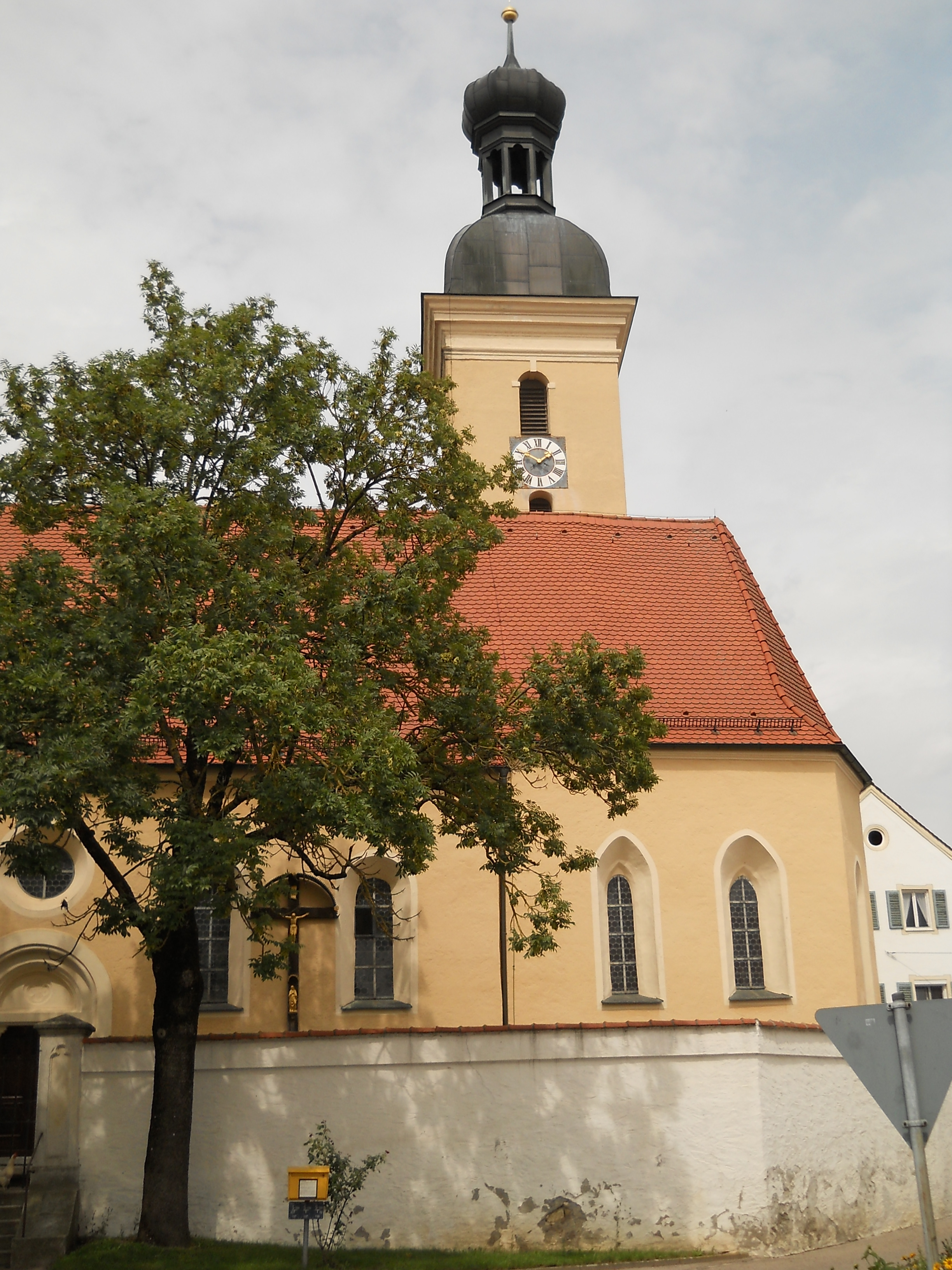 Kath. Kirche St. Stephan in Pettling, Gemeinde Großmehring im Landkreis Eichstätt in Oberbayern